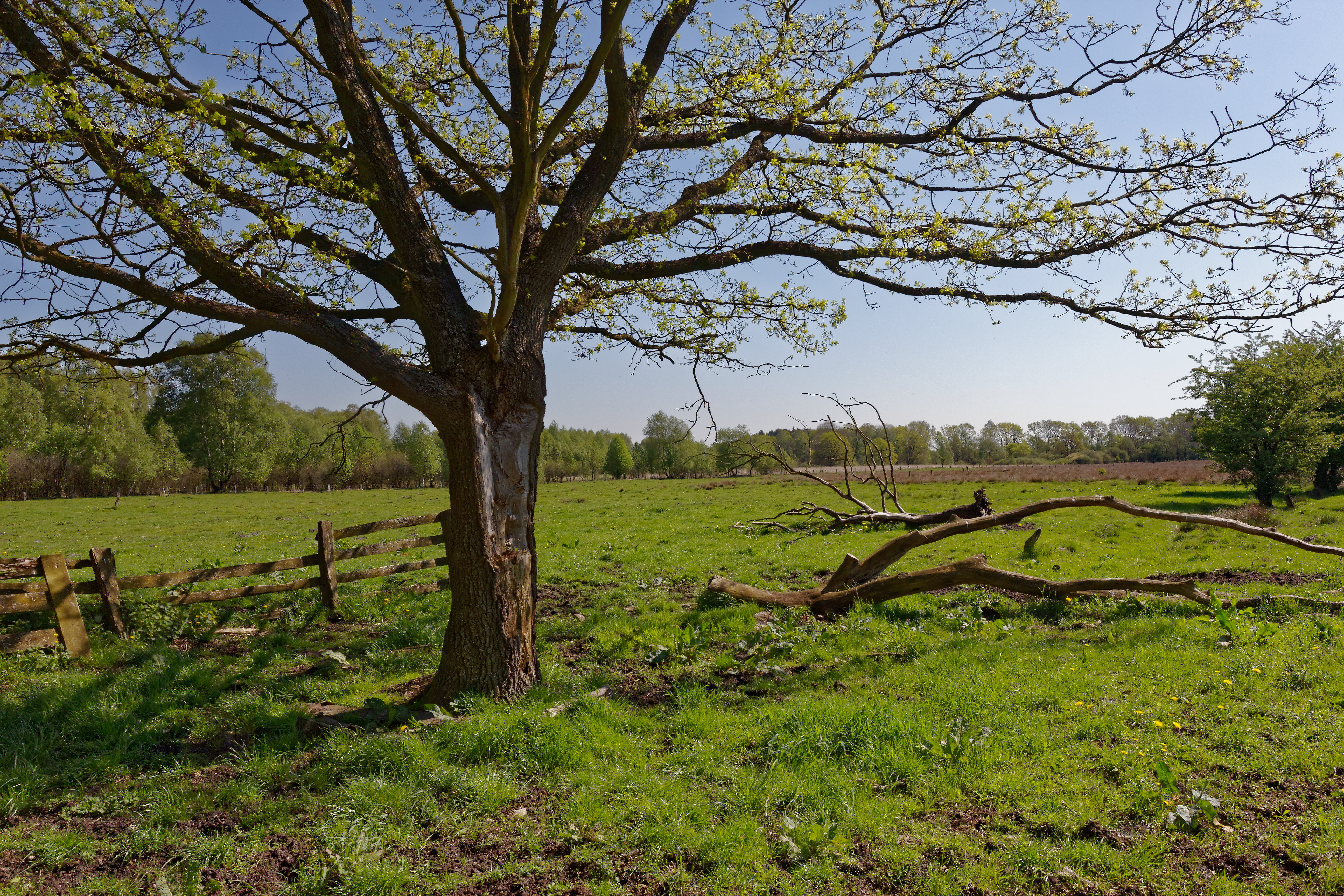 Nördlicher Teil des FFH-Gebietes Wittmoor in Hamburg, Eiche im Wiesenteil